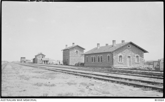 תחנת הרכבת הטורקית בבאר שבע